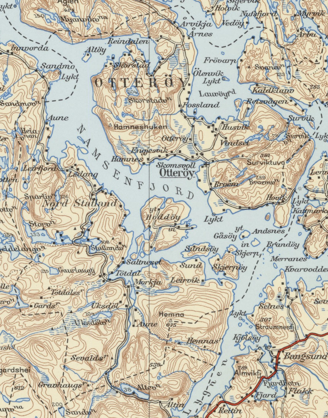 Utsnitt av Otterøy kommune/herred.